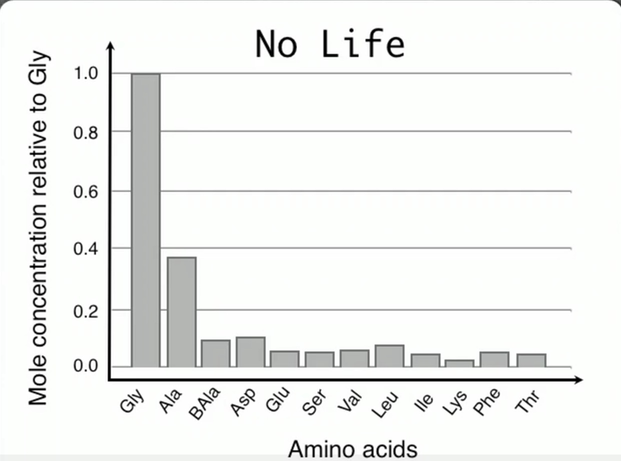 Graphique représentant la réparation des acides aminés dans un environnement non-vivant.